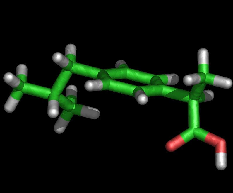 Modèle 3D de la molécule d'ibuprofène. Tracée par mes soins avec le logiciel PyMol.